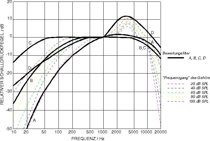 Frequenzgang der Schalldruckpegel-Bewertungsfilter A,B,C,D Vergleich mit dem Frequenzgang des Gehörs bei 20..100 dB